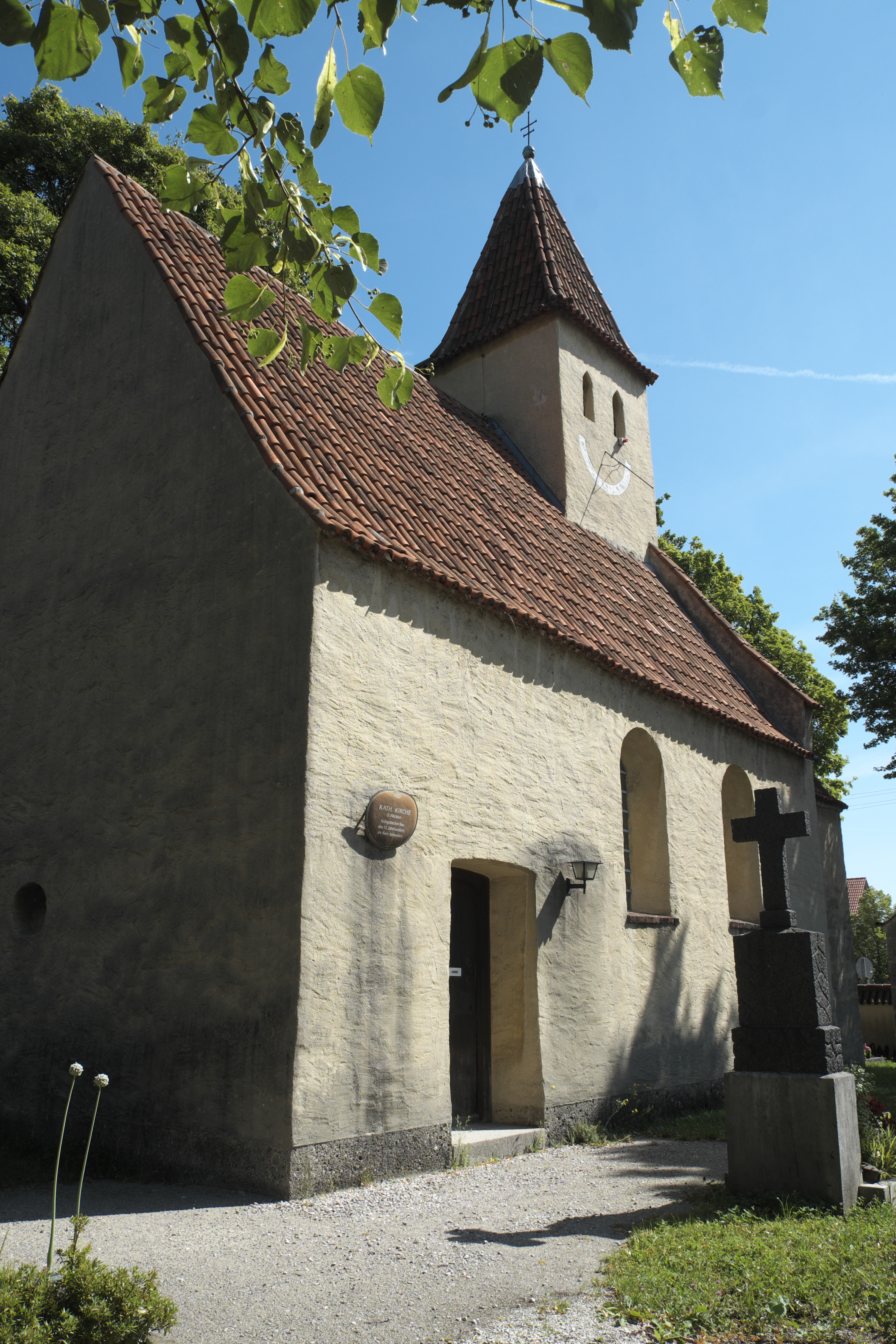 Katholische Kirche St. Nikolaus in Englschalking im Stadtbezirk Bogenhausen in München (Bayern/Deutschland)